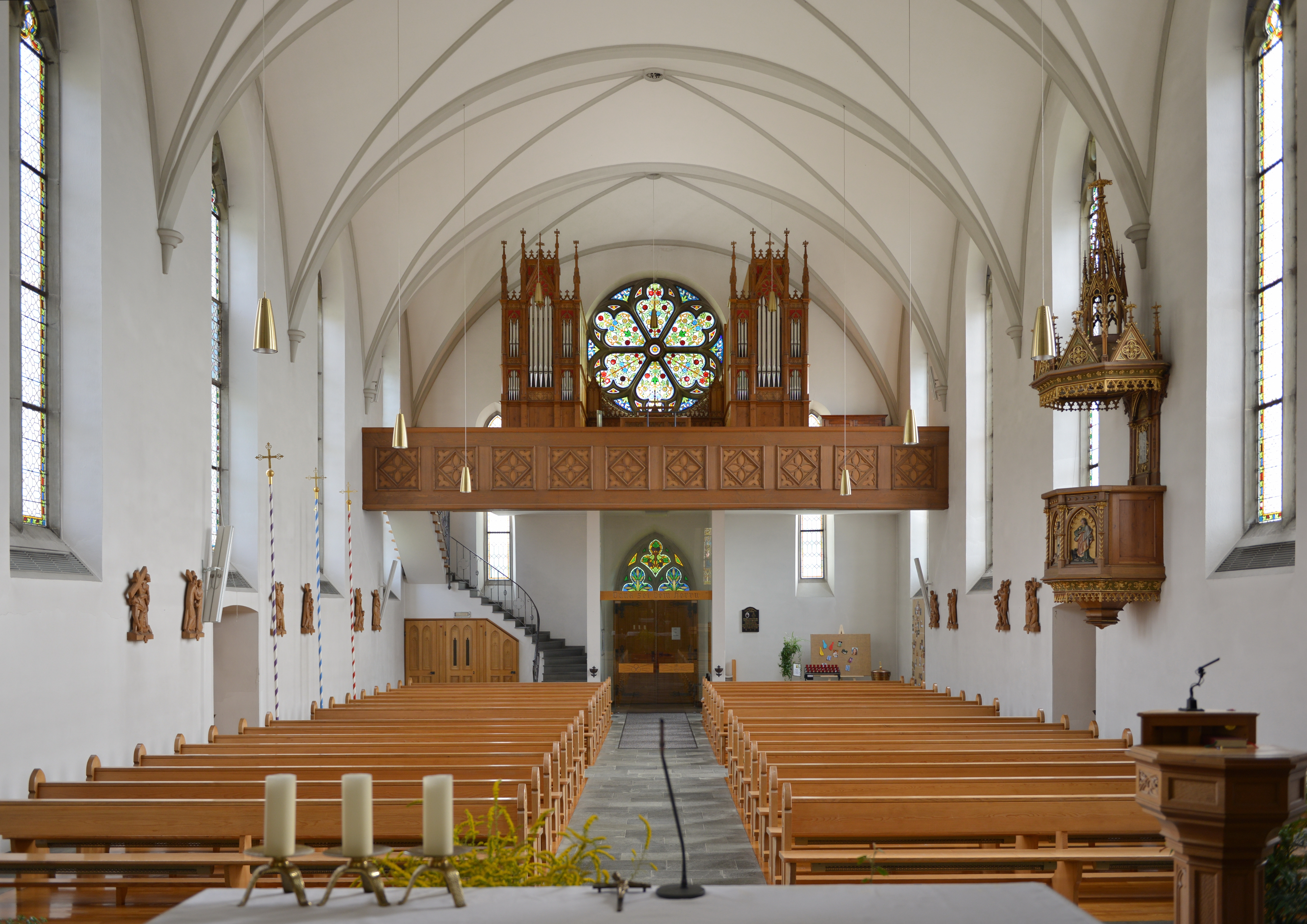 Kath. Pfarrkirche hl. Jakobus d. Ä. und Friedhof, Im Dorf 6 in Fraxern.